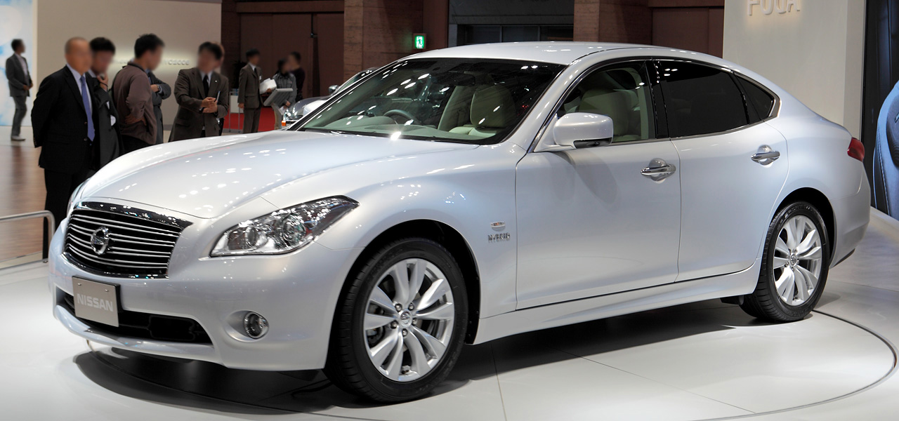 Nissan Fuga.